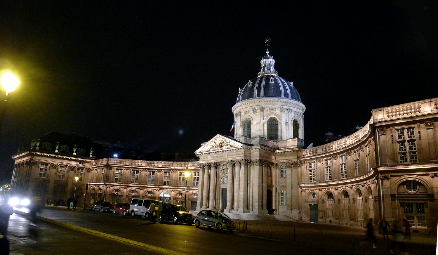 Institut de France, quai de Conti - Paris VII